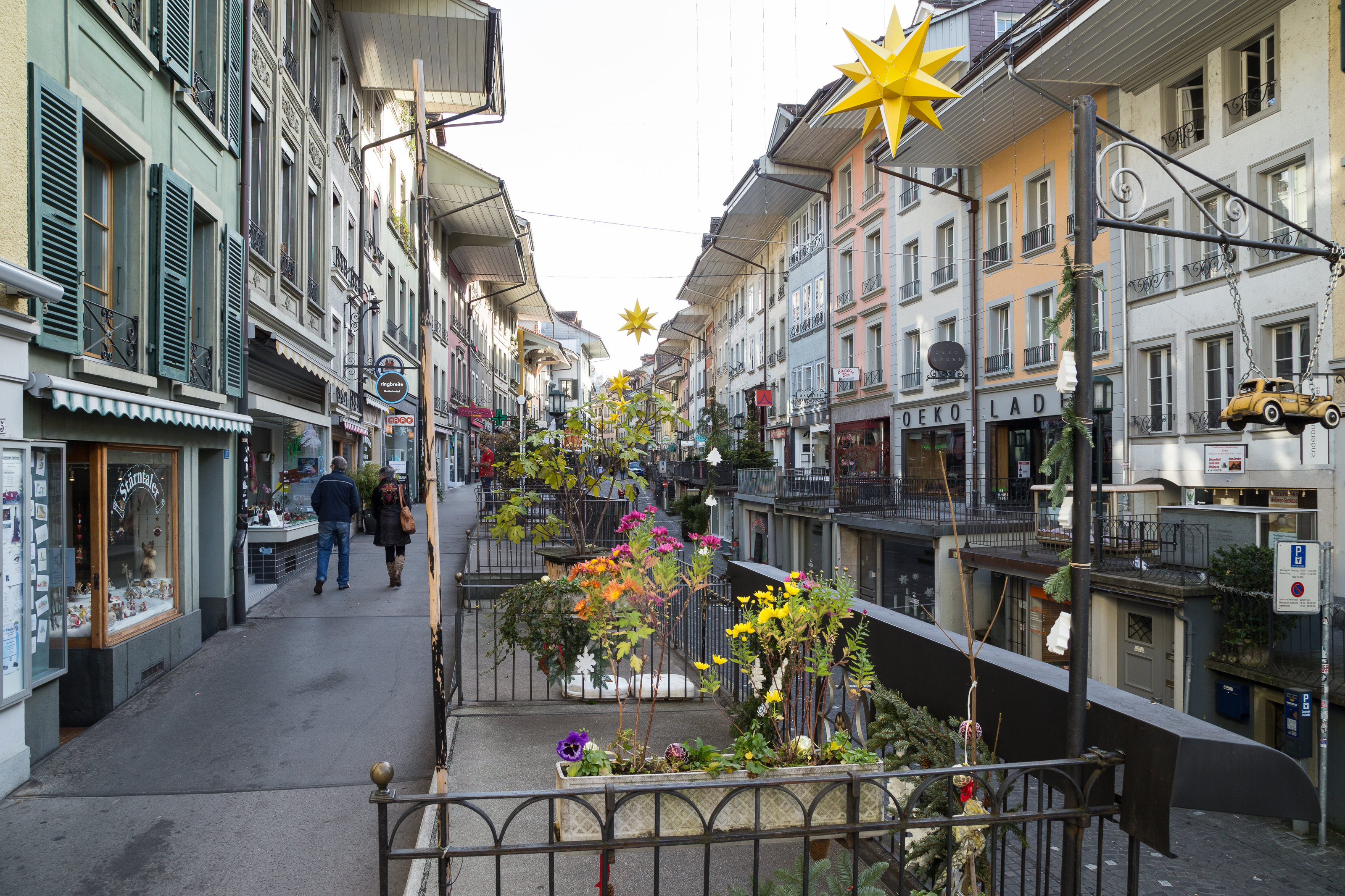 Thun, Kanton Bern: Obere Hauptgasse mit Hochtrottoirs